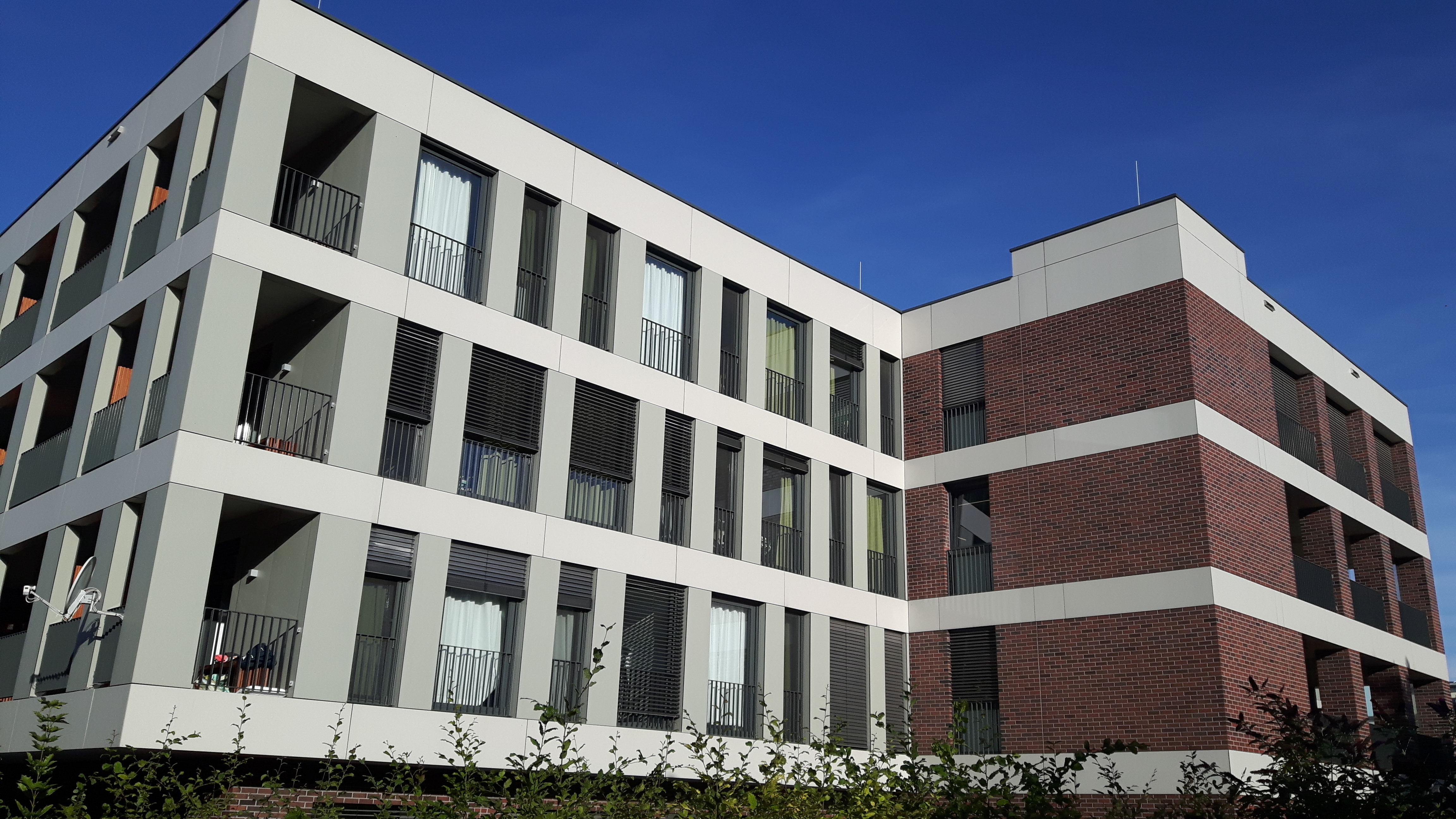 Universitäts- und Rehabilitationskliniken Ulm